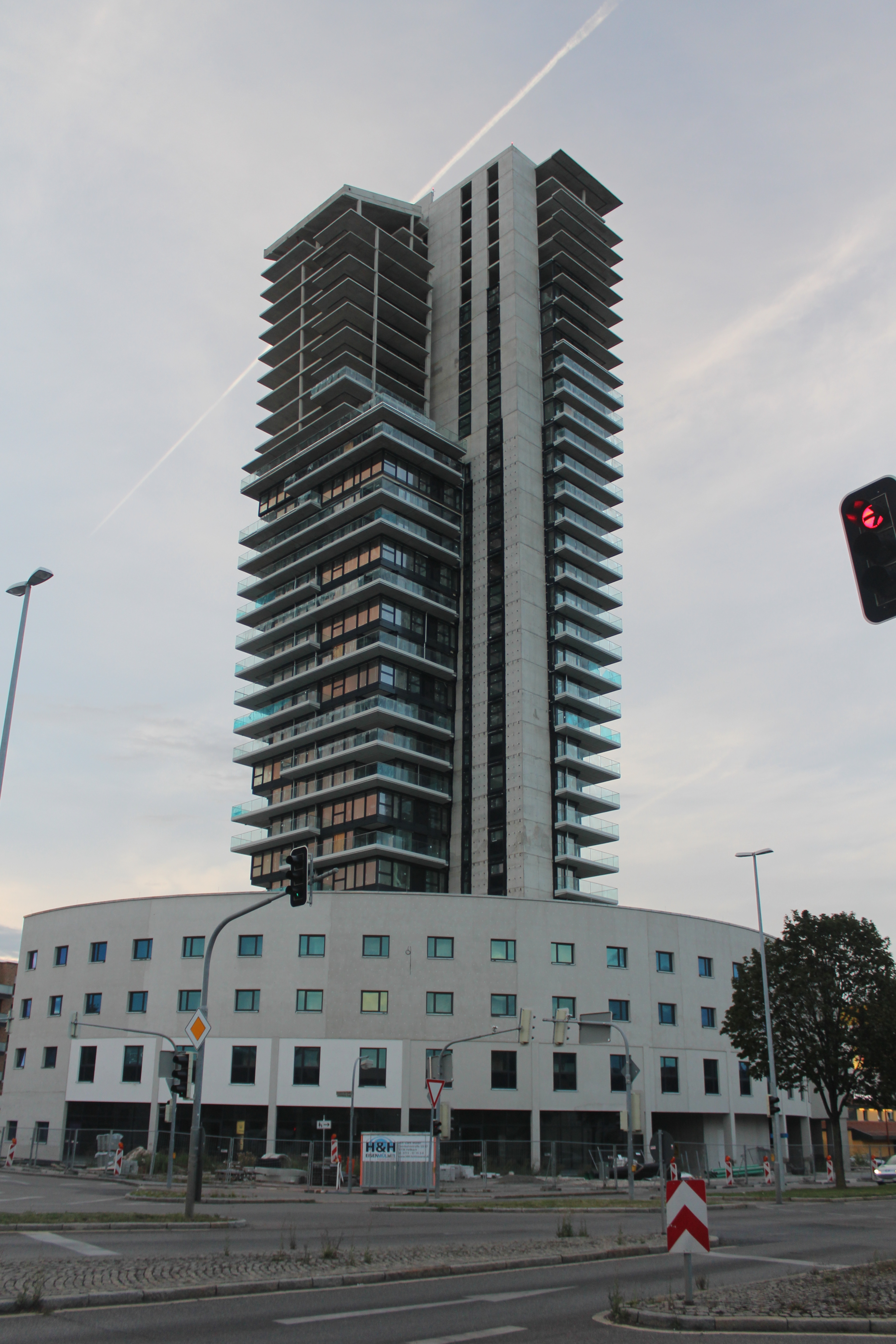 Gewa-Tower Fellbach